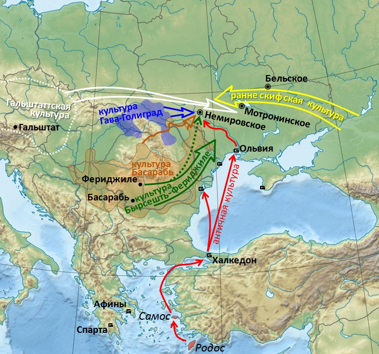 Культурные импульсы Немировского городища